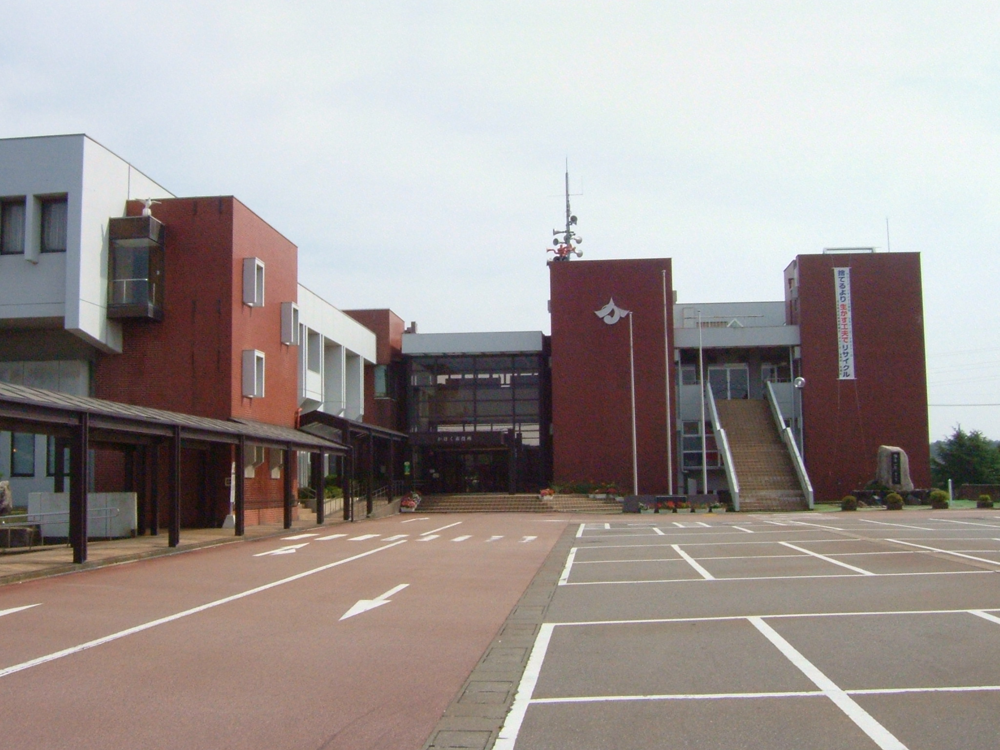 かほく市役所（石川県かほく市）